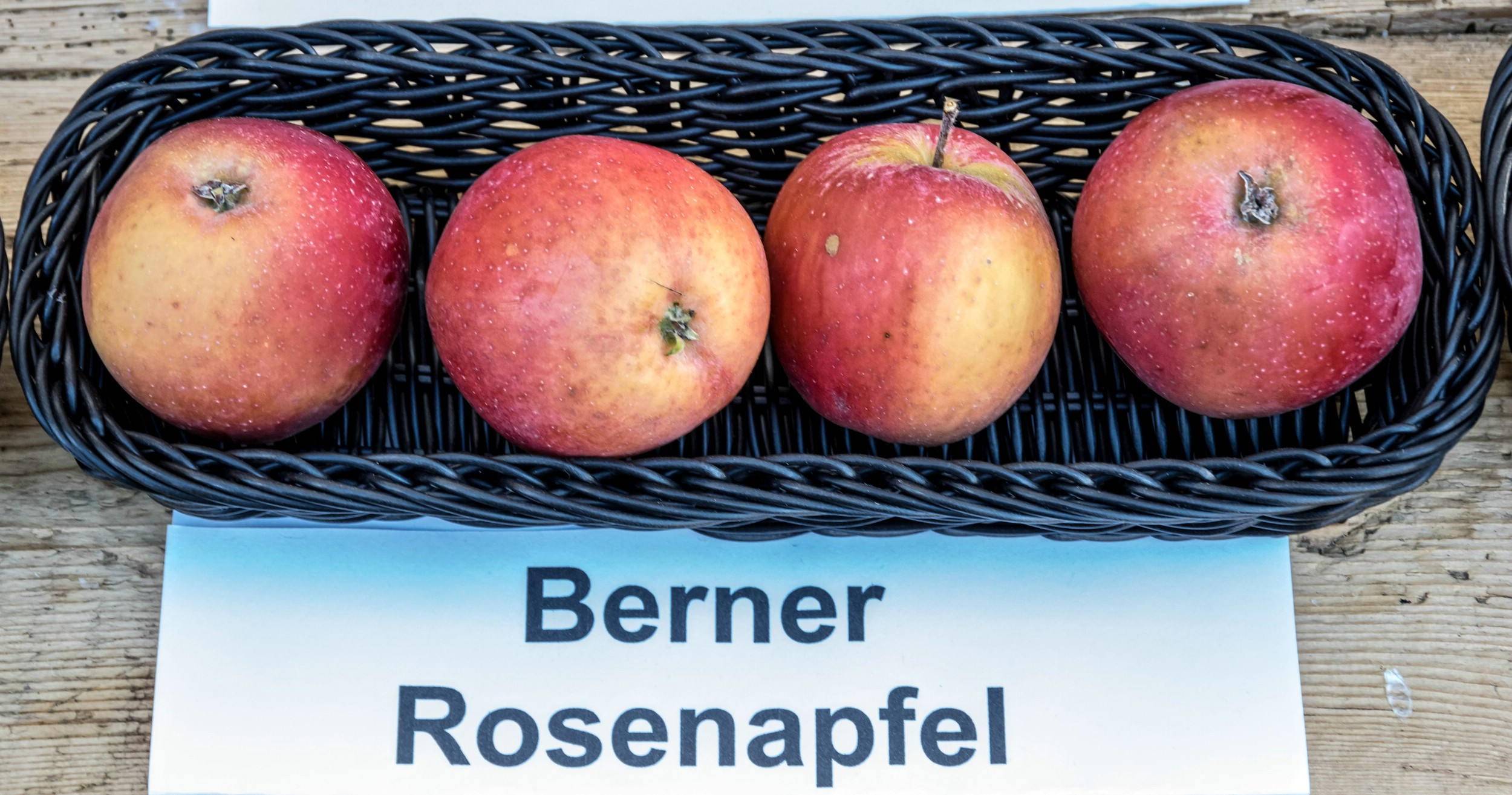 Alte Apfelsorten, von denen es im Badischen noch tragende Bäume gibt. Alle Aufnahmen au dem Oktober 2015